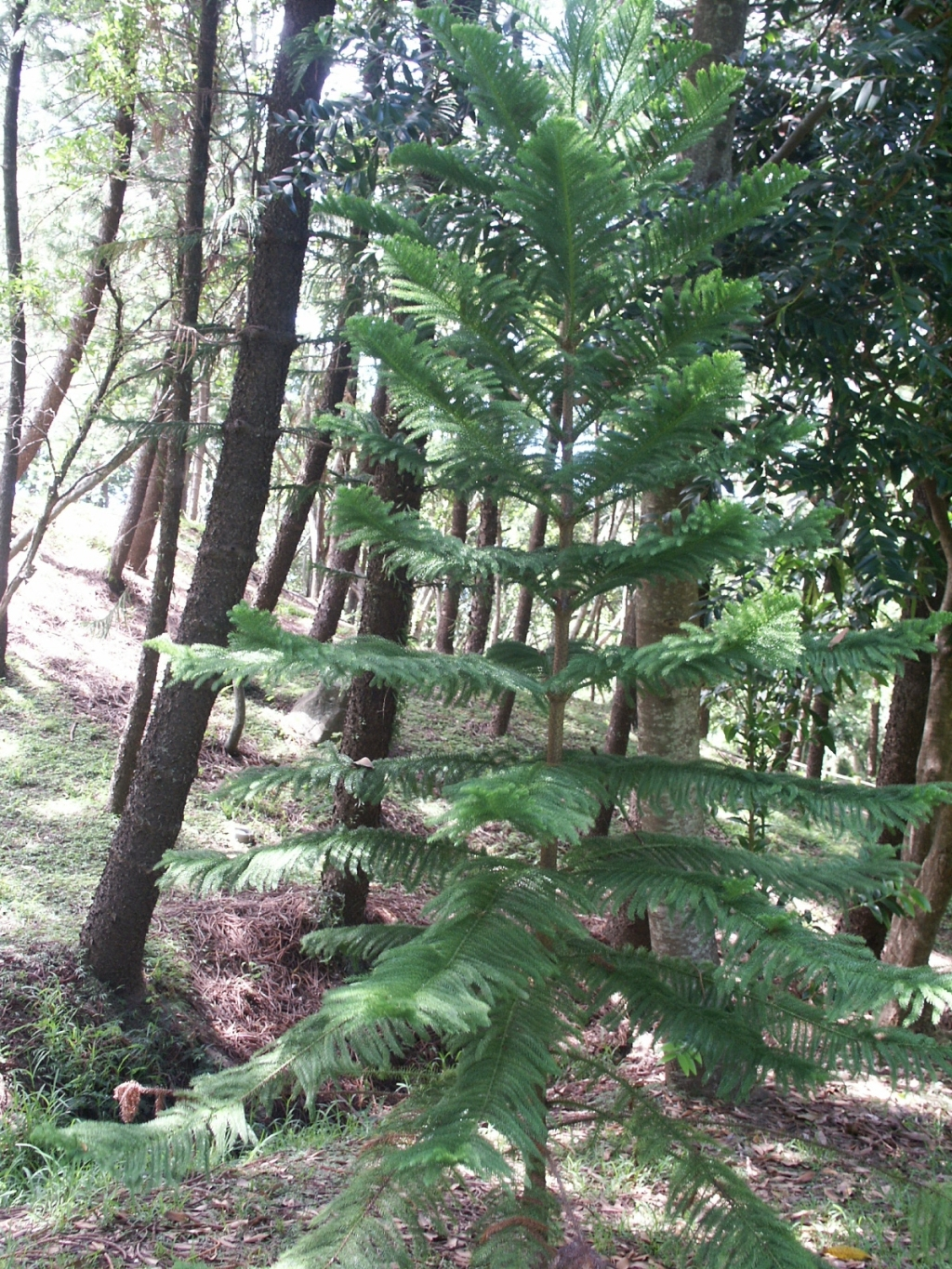 Jeune exemplaire d'Auracaria nemorosa au parc forestier de Nouméa.